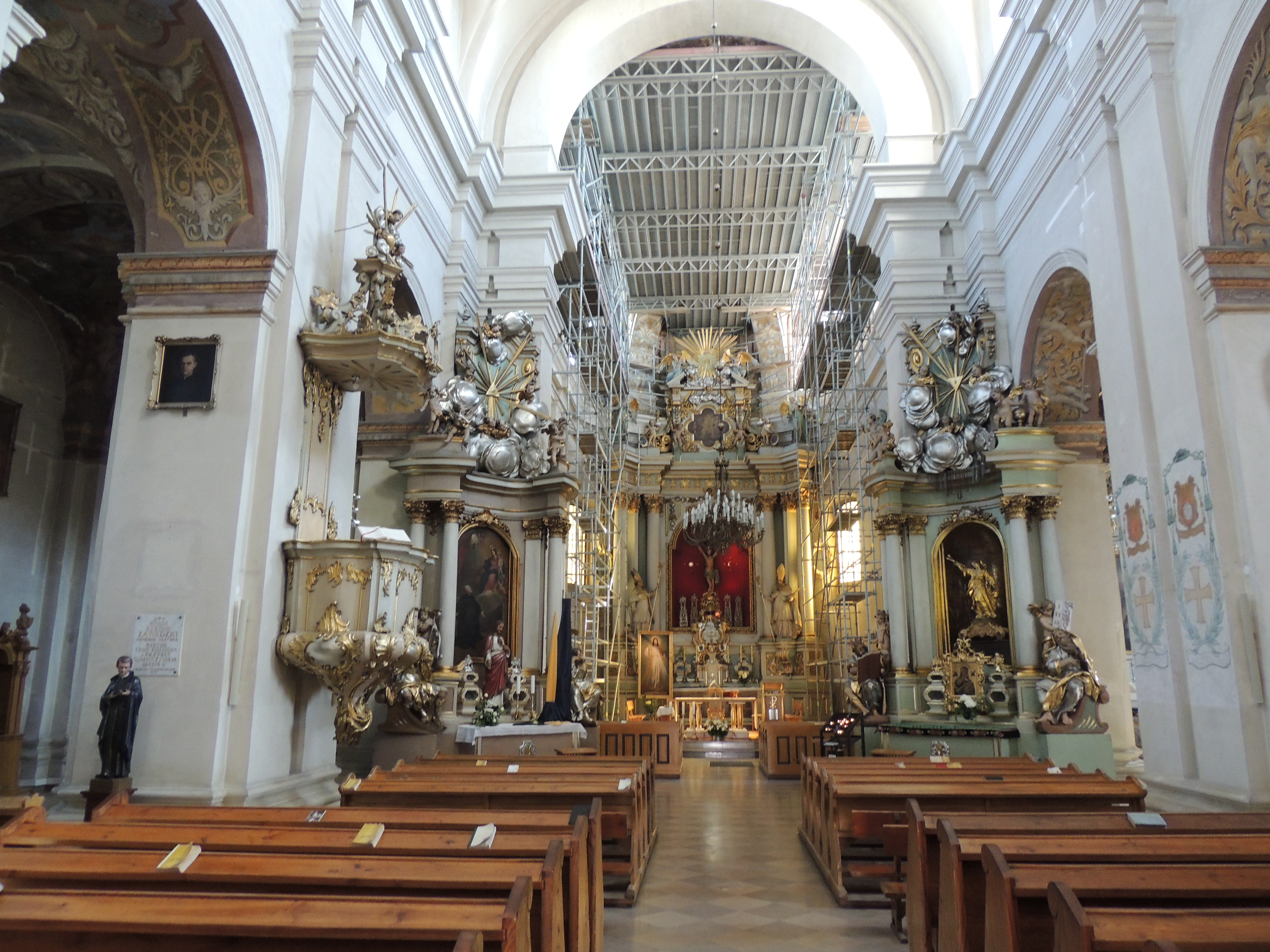 Łowicz, kościół klasztorny pijarów p.w. NMP i św. Wojciecha, 2 poł. XVII, XVIII, XIX